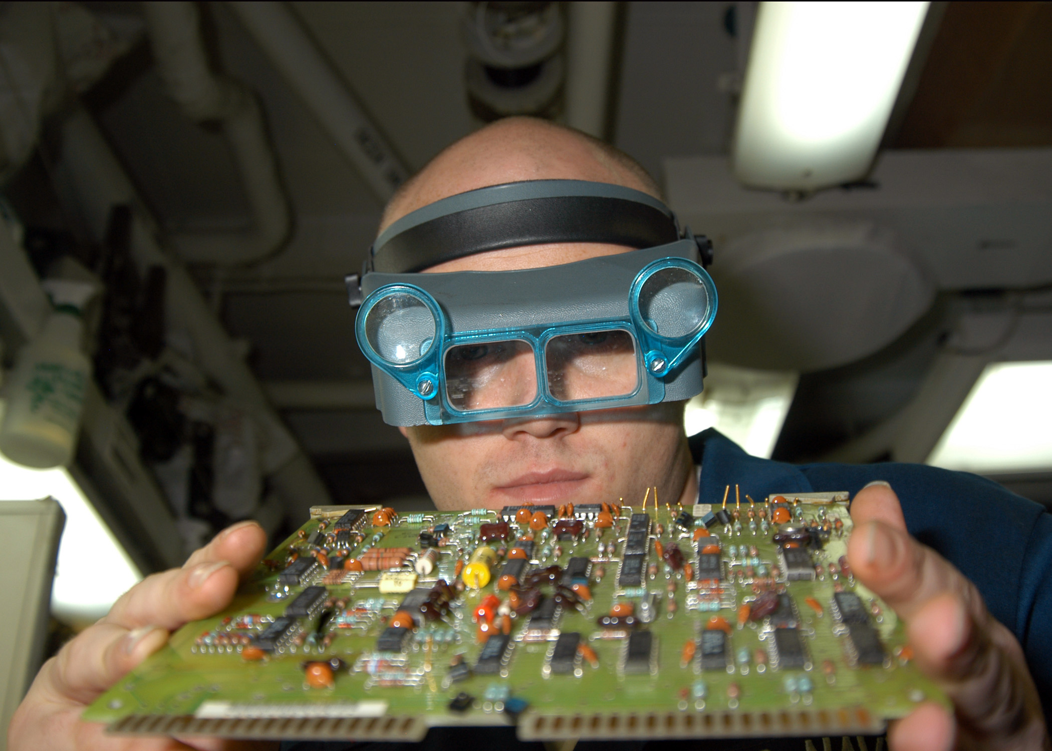 AN/SPS-67 circuit